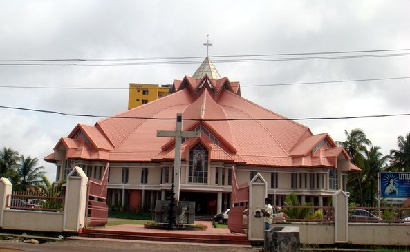 ചെറുപുഷ്പം‌പള്ളി-കടവന്ത്ര